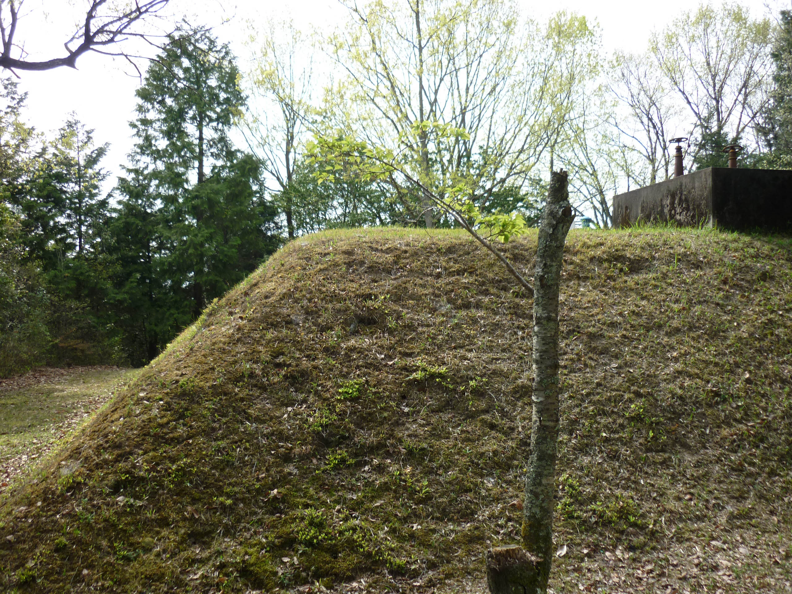 曲輪跡